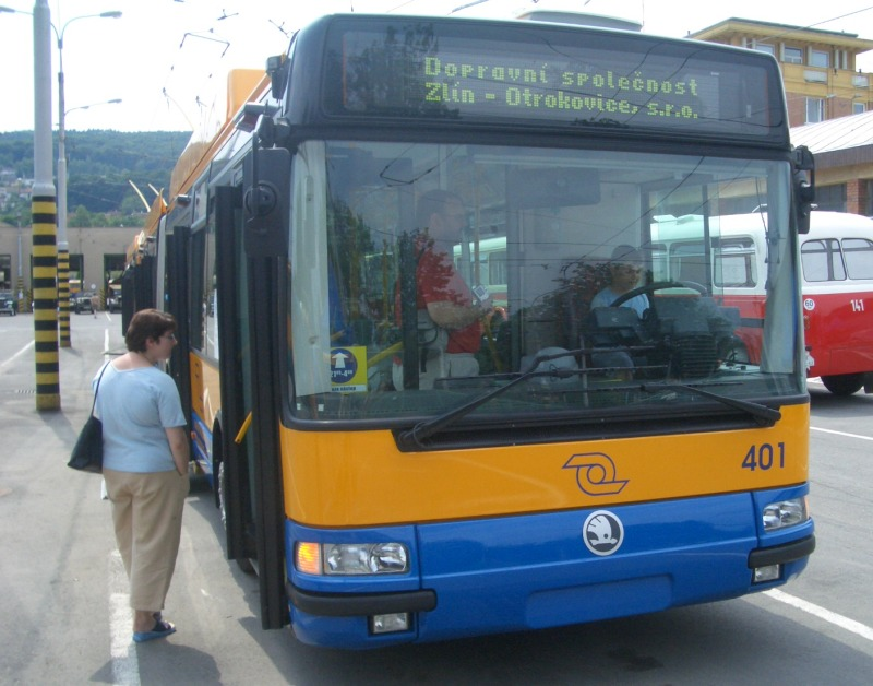 Nejnovější typ škodováckého kloubového trolejbusu Irisbus 25Tr